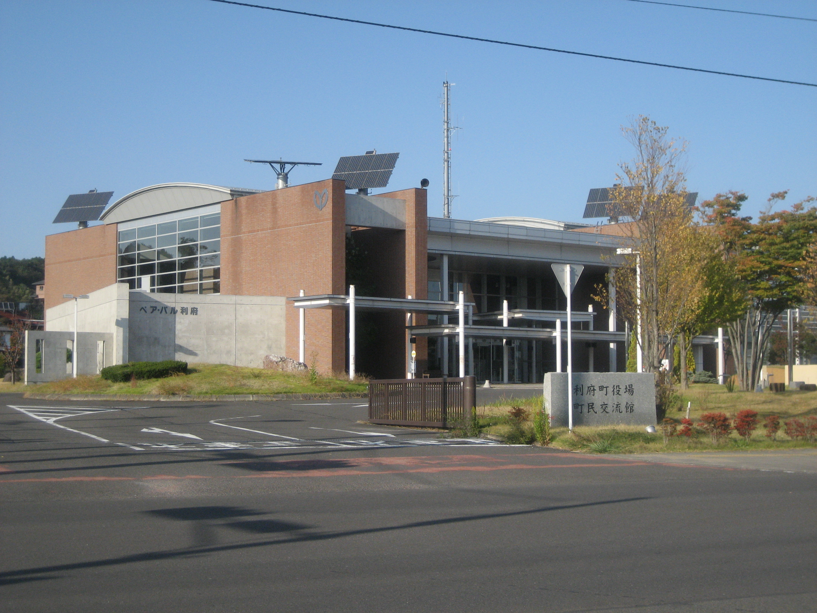 宮城県利府町役場及び町民交流センター